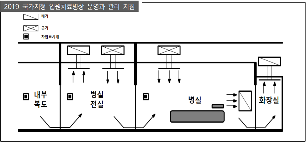 2019 국가지정 입원치료병상 운영과 관리 지침